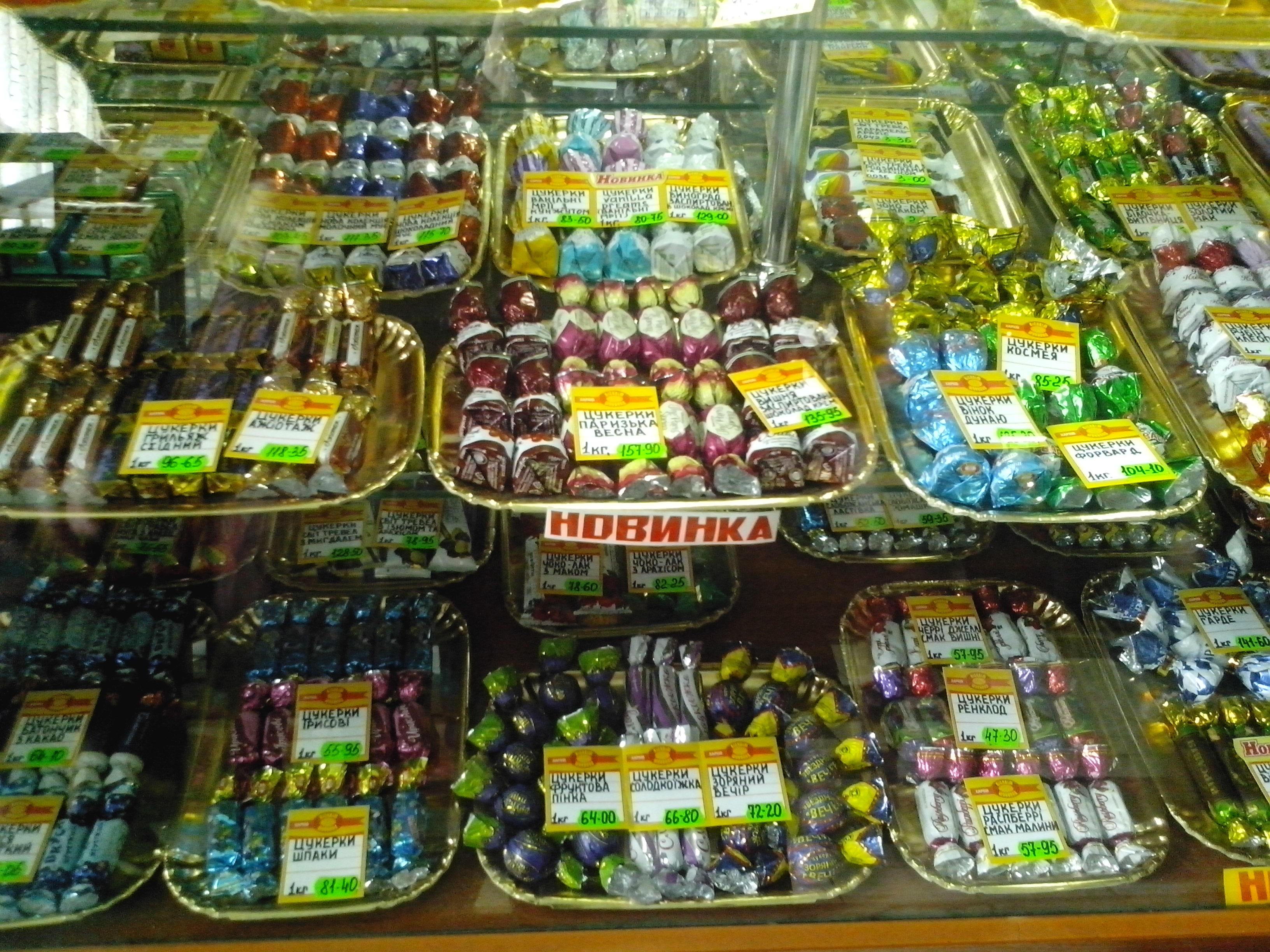 ЗАТ Харківська бісквітна фабрика, магазин Ведмедик